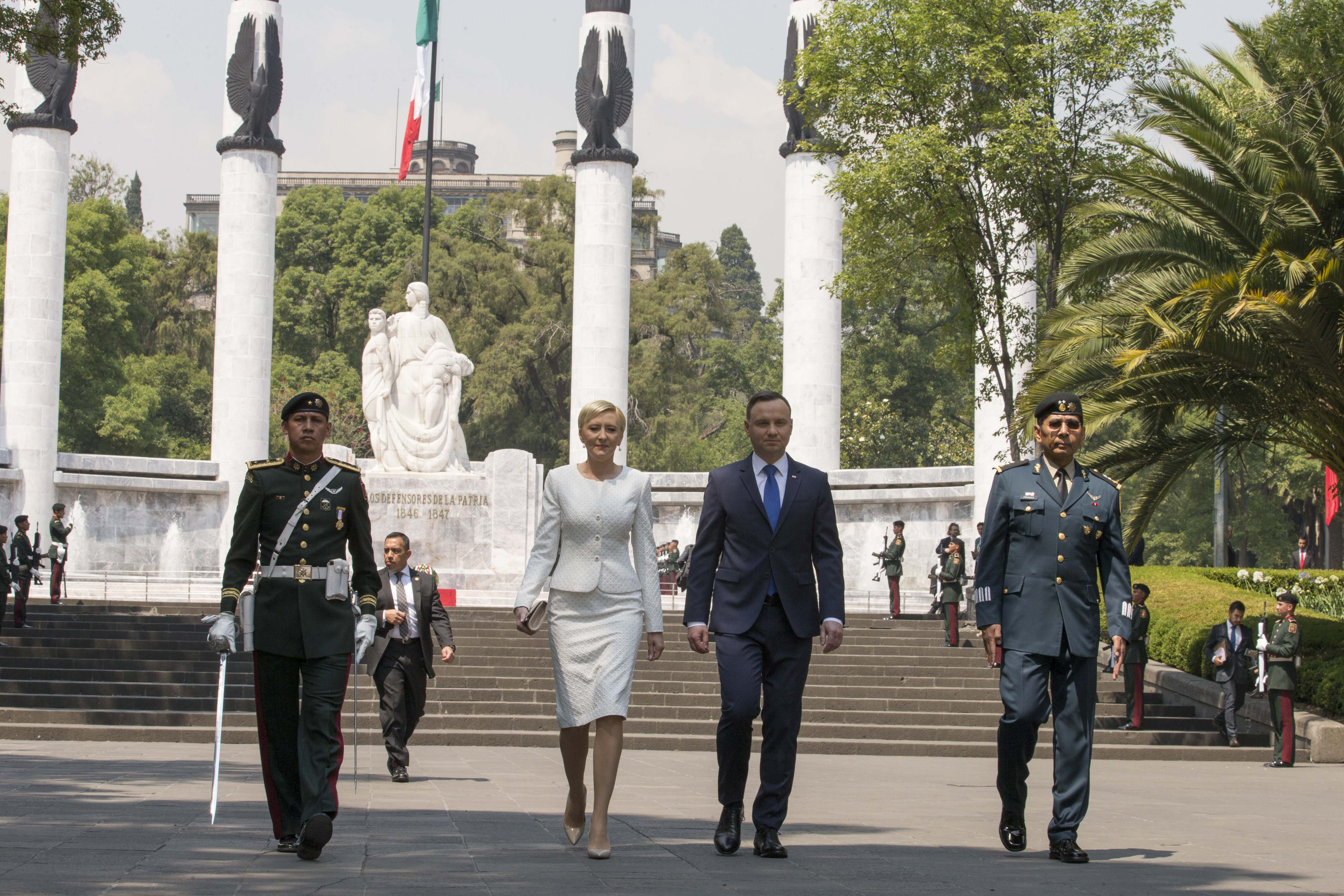 Visita Presidente de Polonia a México (1)